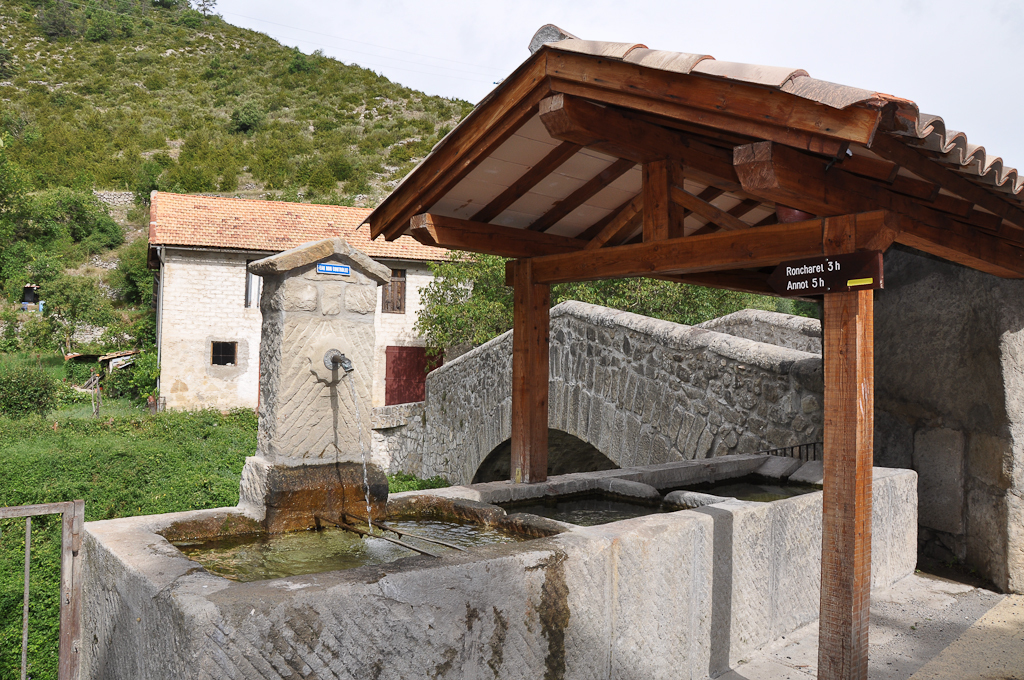 Le Fugeret, pont et lavoir